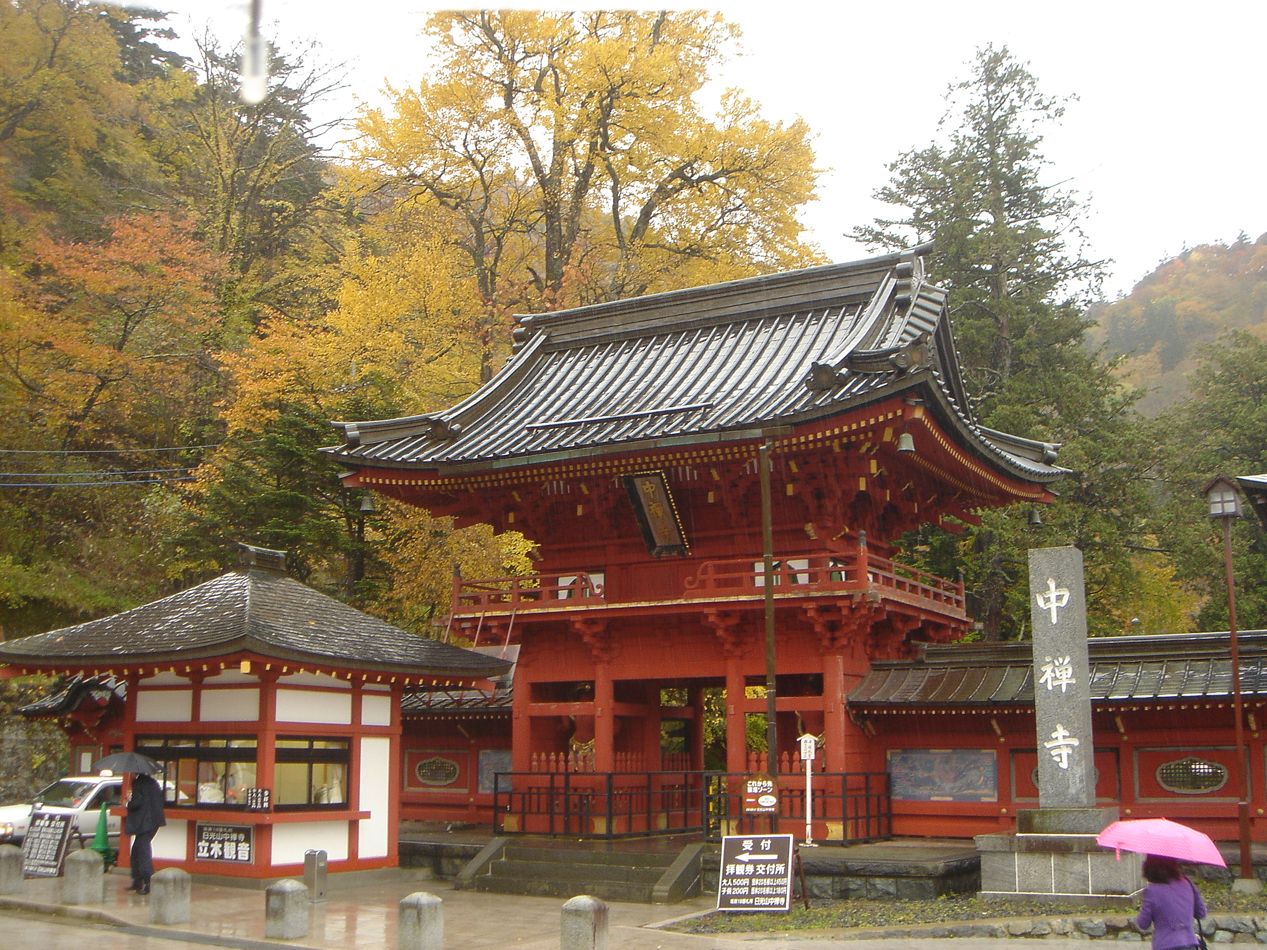 The Chuzenji temple, Nikko